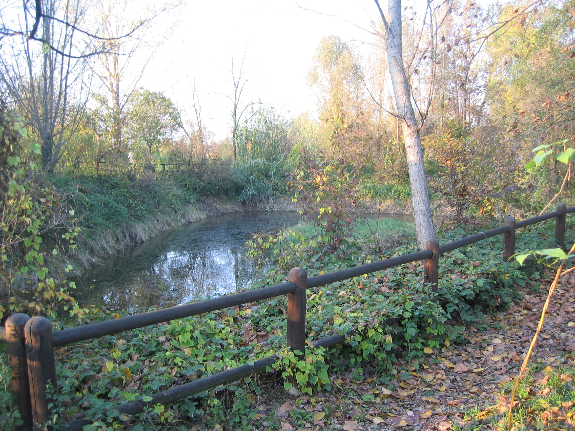 l'unico fontanile di treviglio